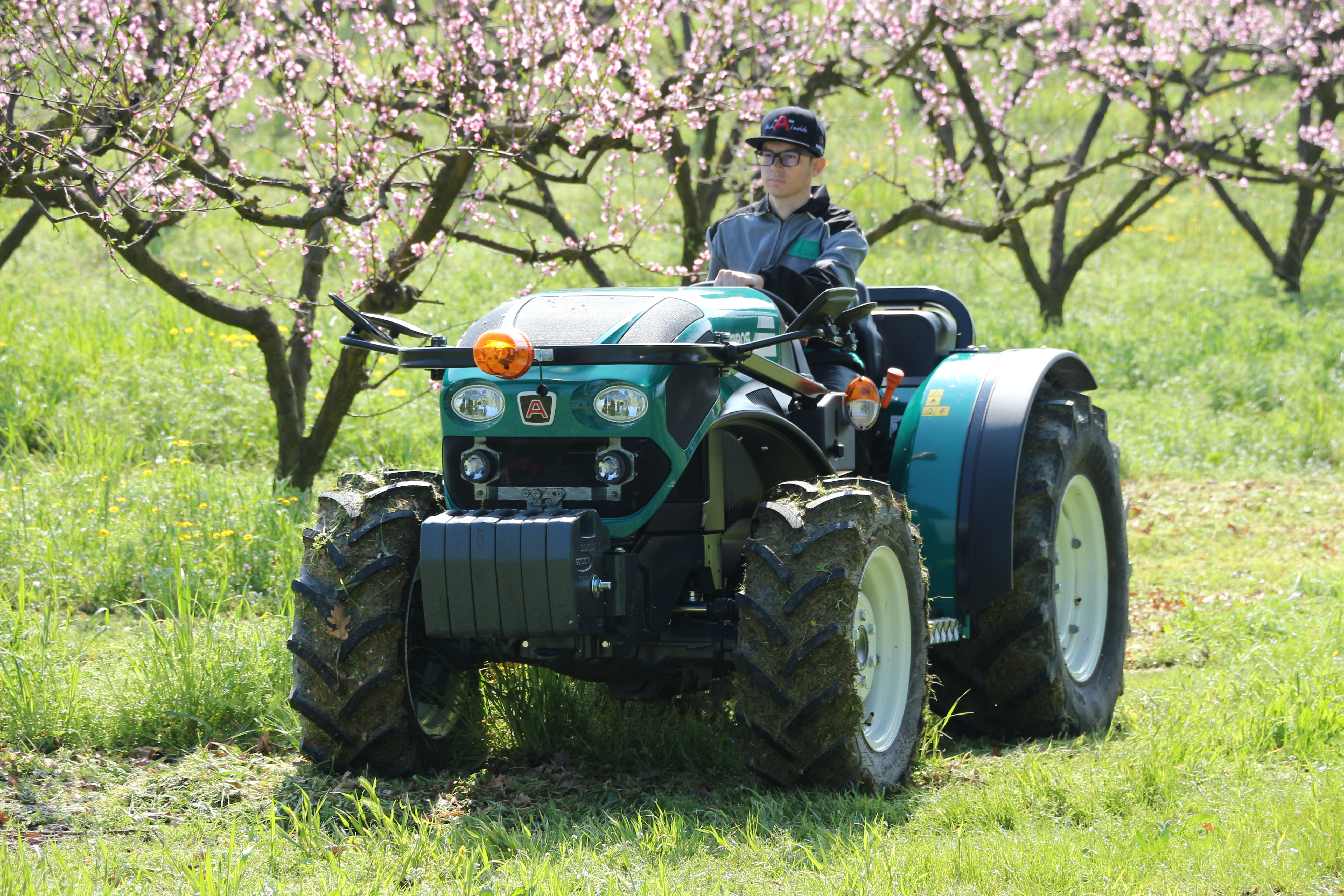 trattore da frutteto e vigneto